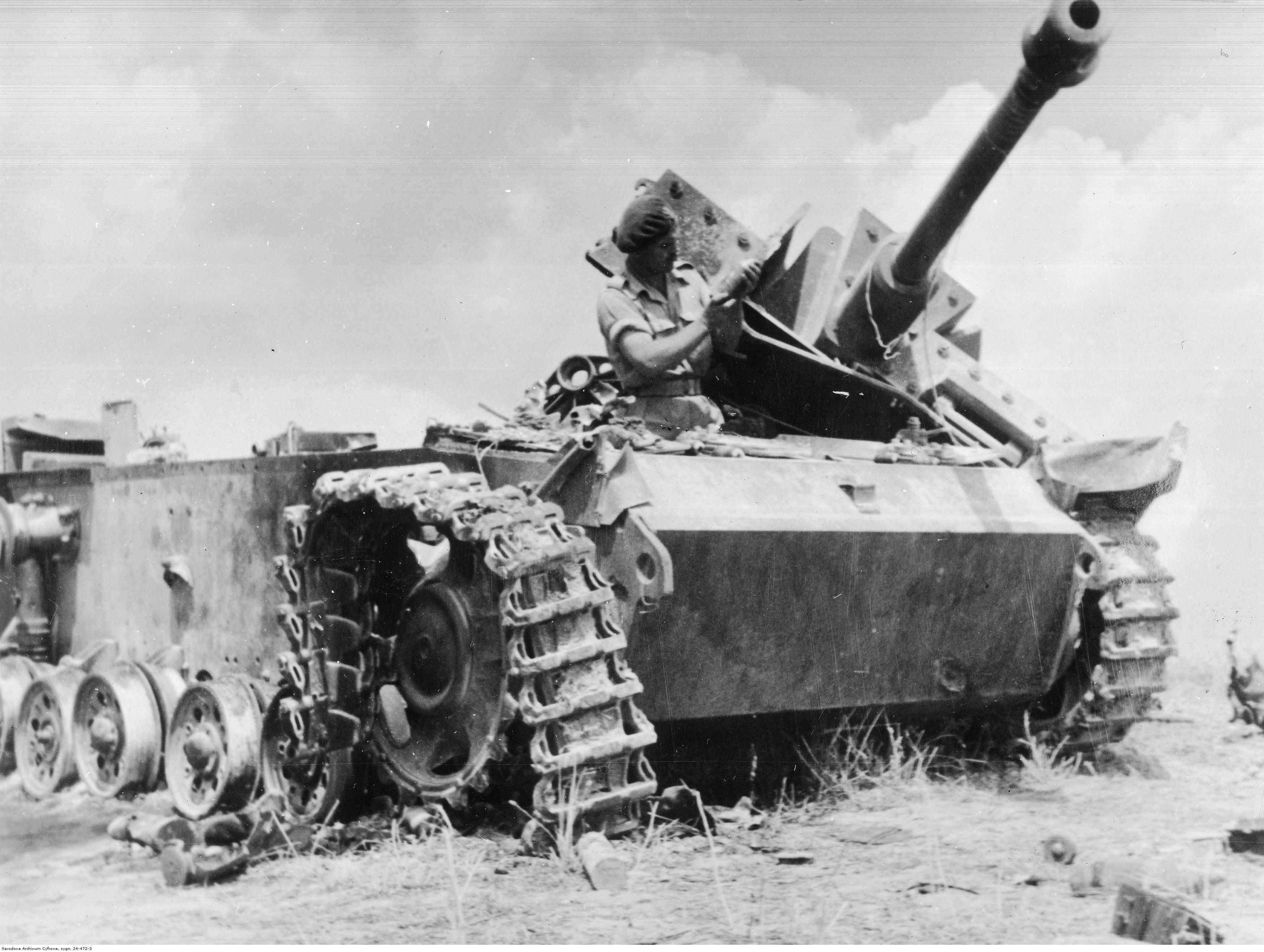 Żołnierze 2 Korpusu Polskiego podczas walk o Montoro. Niemieckie działo pancerne Sturmgeschutz III (StuG III) zniszczone przez 6 Pułk Pancerny "Dzieci Lwowskich". Archiwum Fotograficzne Tadeusza Szumańskiego. Sygnatura: 24-472-3